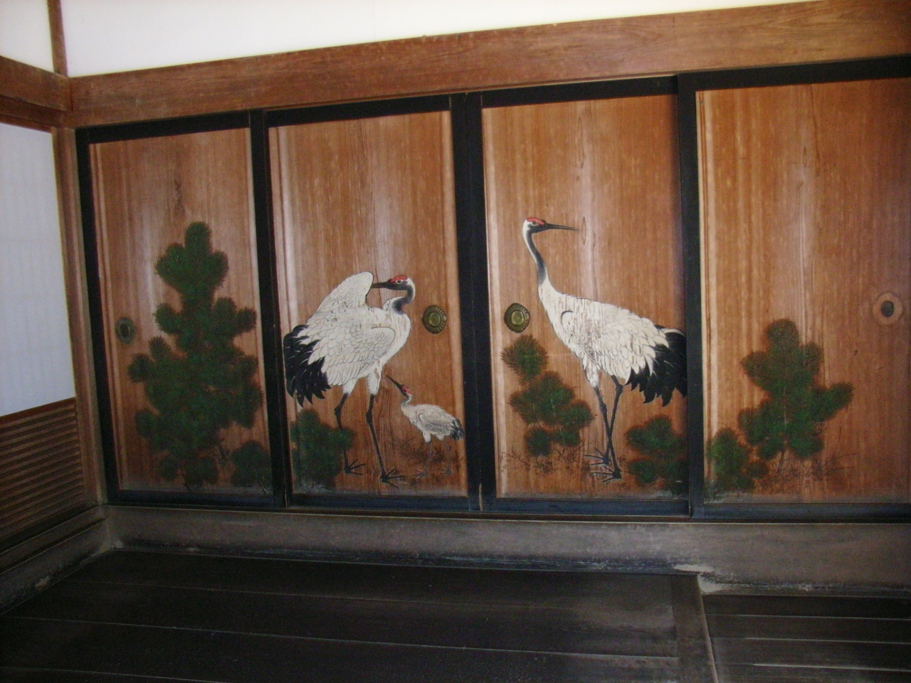 Храм Конгобу-дзи Храм Конгобу-дзи на горе Коя-сан, живопись